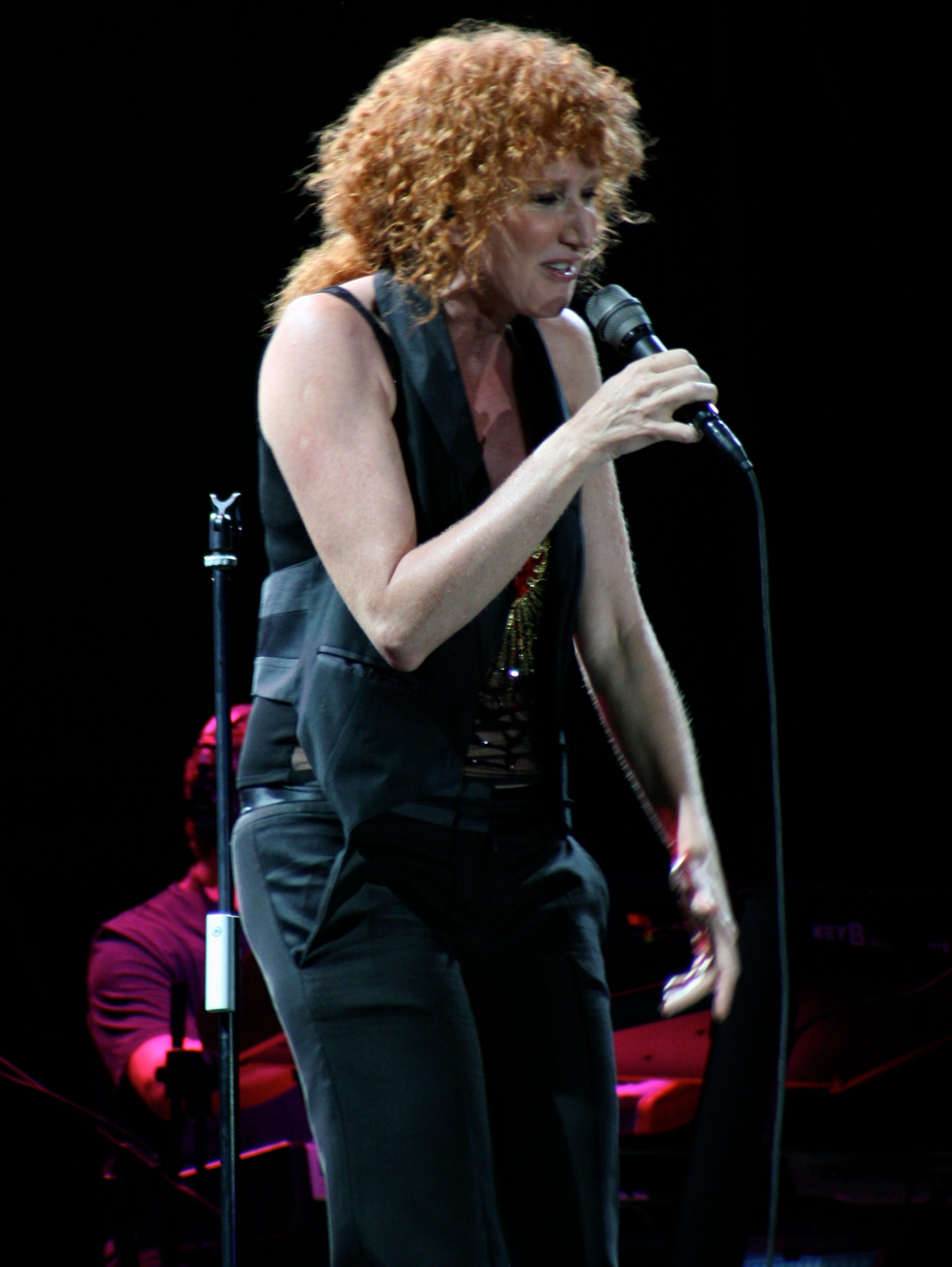 Fiorella Mannoia in concerto.